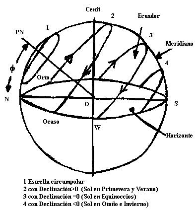 Esta imagen está hecha por la persona que la subió y cedida a Wikipedia.